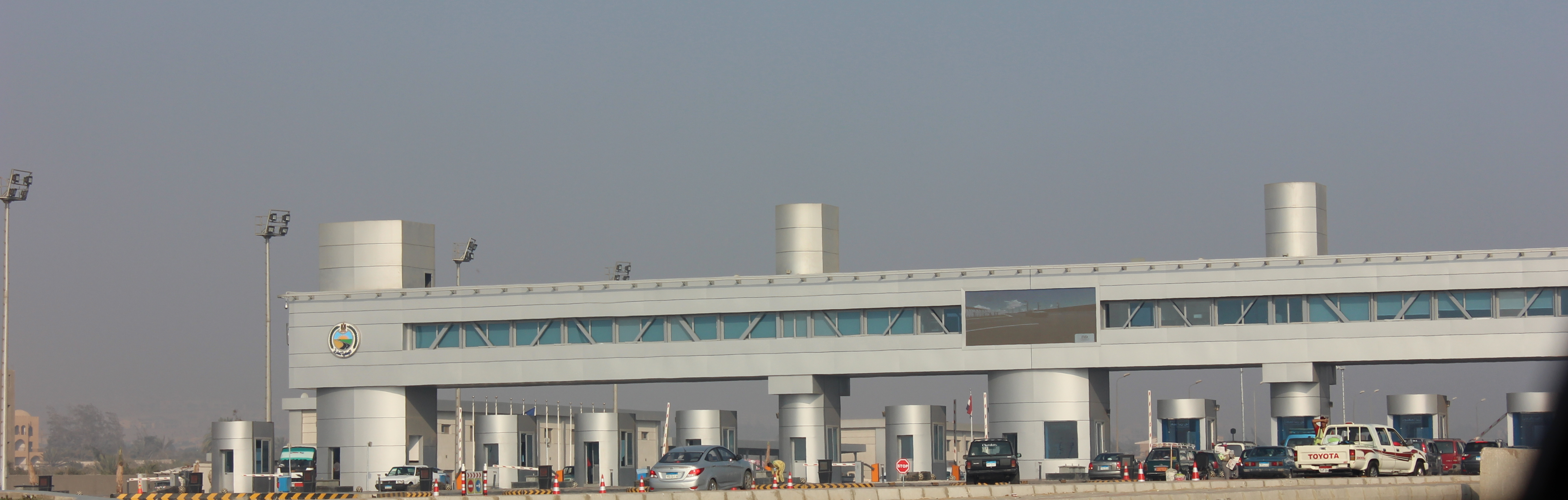 كارتة عبور الطريق في الكيلو 29 طريق مصر الإسكندرية الصحراوي.